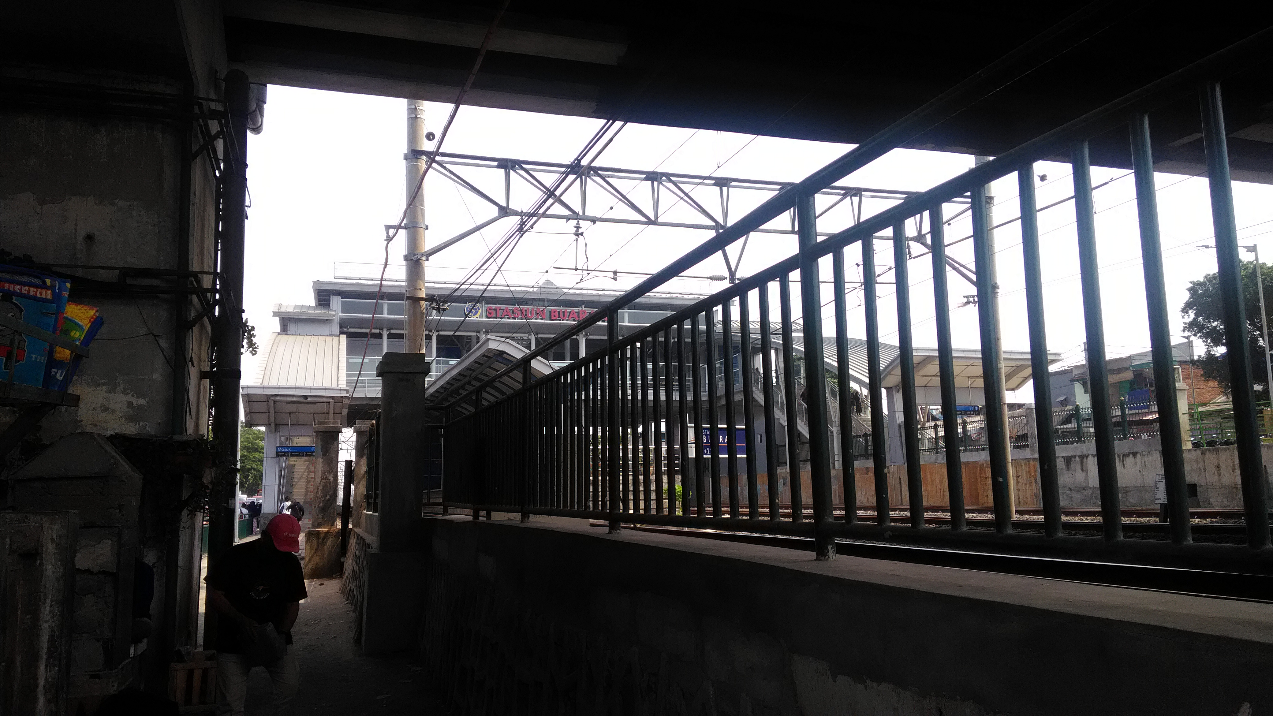 Stasiun Buaran diambil foto dari Flyover Raden Intan, 2019